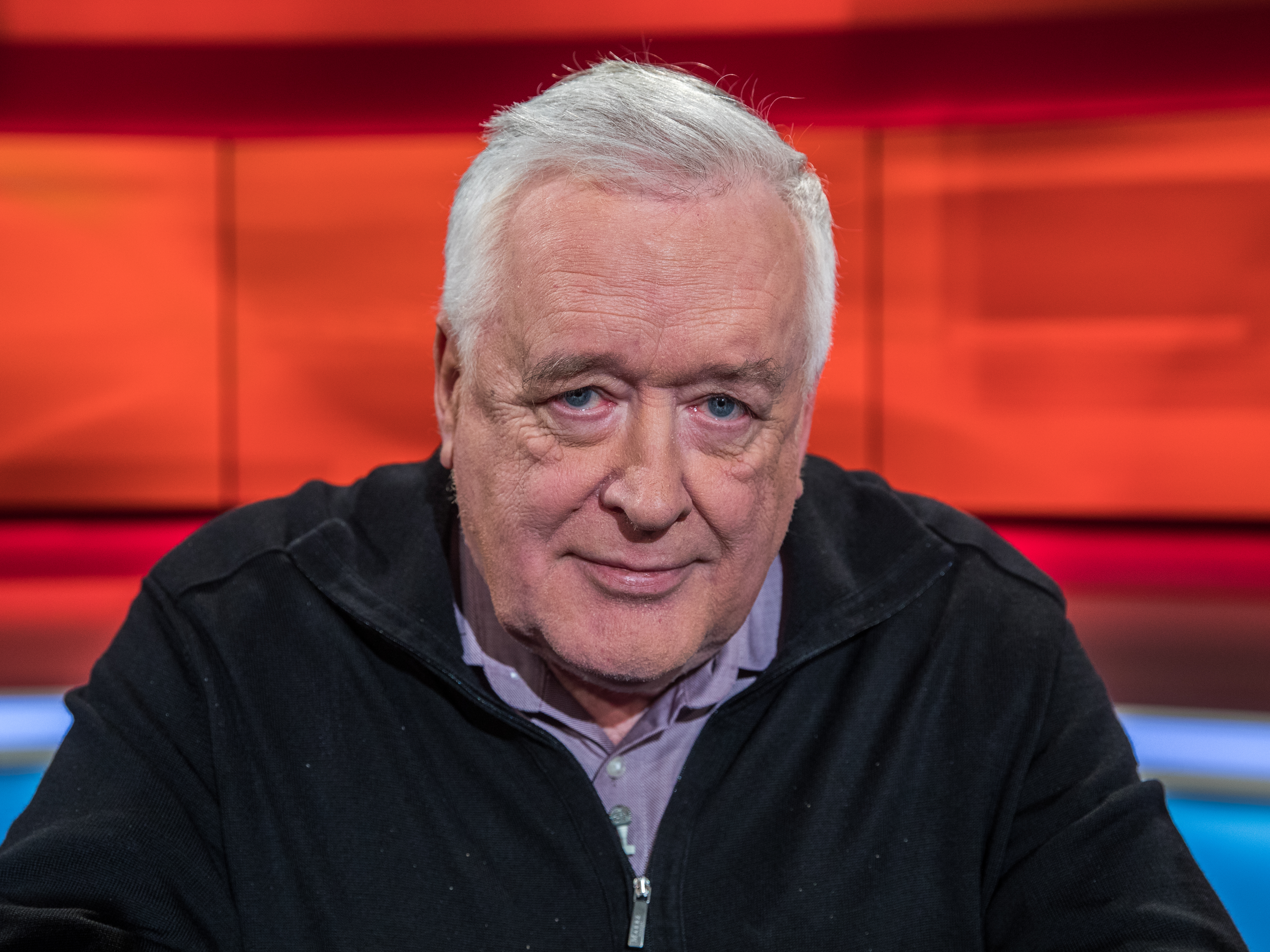 Pressetermin nach der Sendung „Hart aber Fair“ am 2. Dezember 2019. Thema der Sendung: „Weckruf oder Panikmache: Braucht das Klima eine Öko-Revolution?“ Foto: Hans von Storch, Klimaforscher